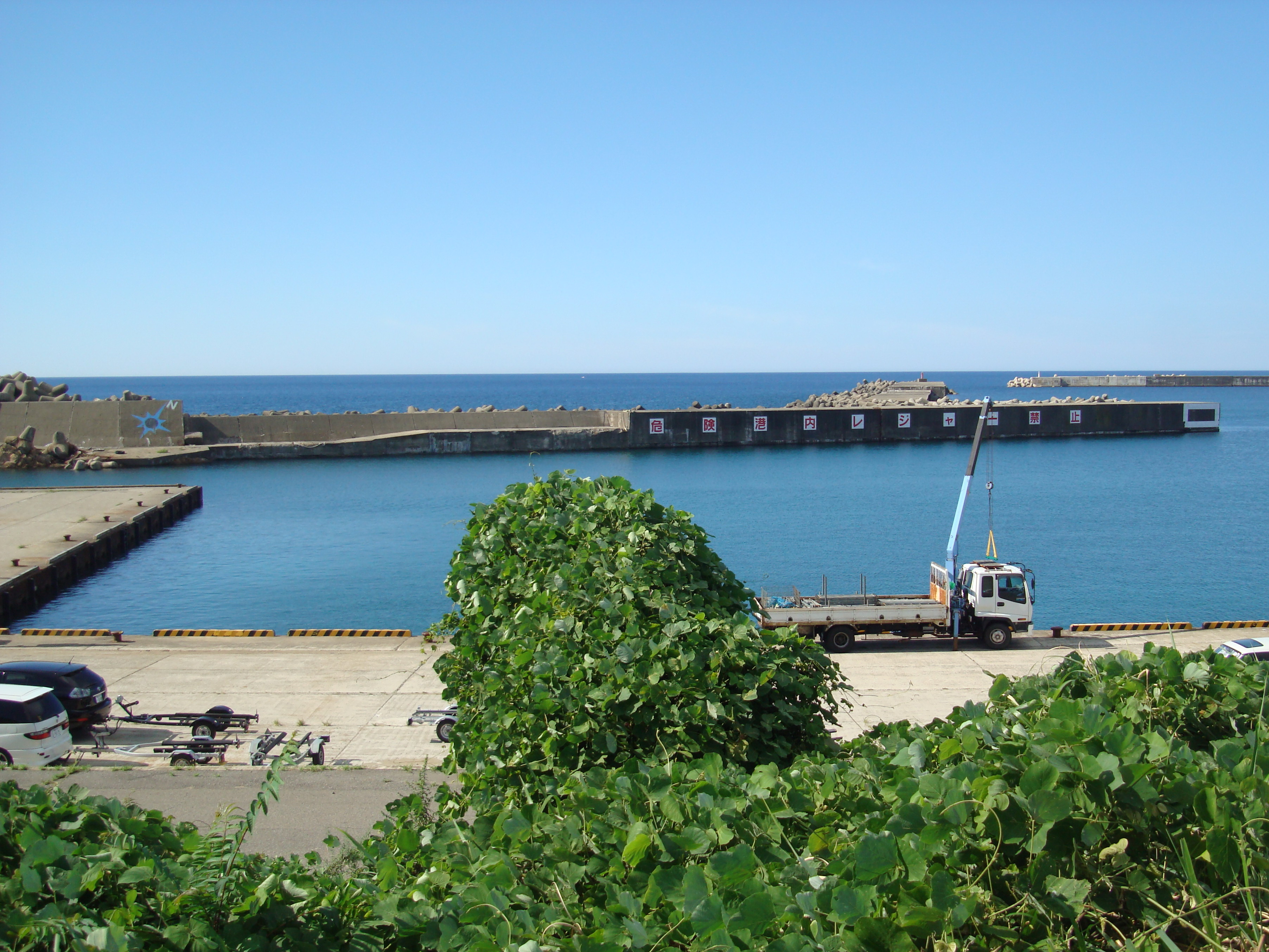 鷹巣港（鷹巣地区）